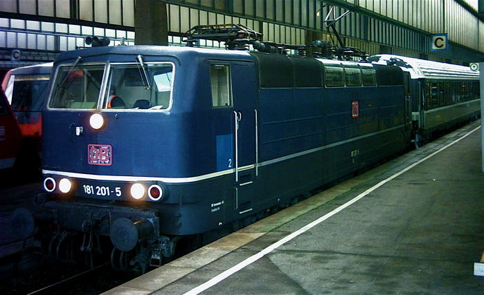 181 201 vor dem Nachtzug aus Paris in Stuttgart Hauptbahnhof Dezember 2005. Autor: Michael Meding, Quelle: Selbst Fotografiert Dezember 2005, Samstag früh